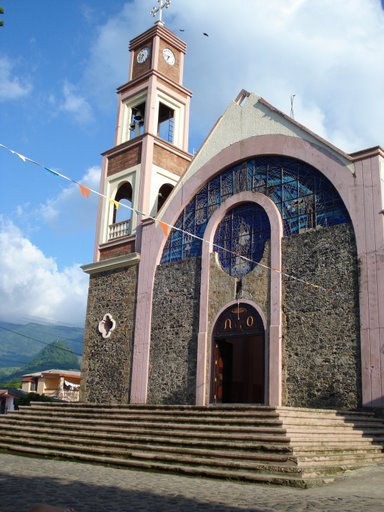 Fachada principal de la Parroquia de Santa Catarina en Chontla, Veracruz